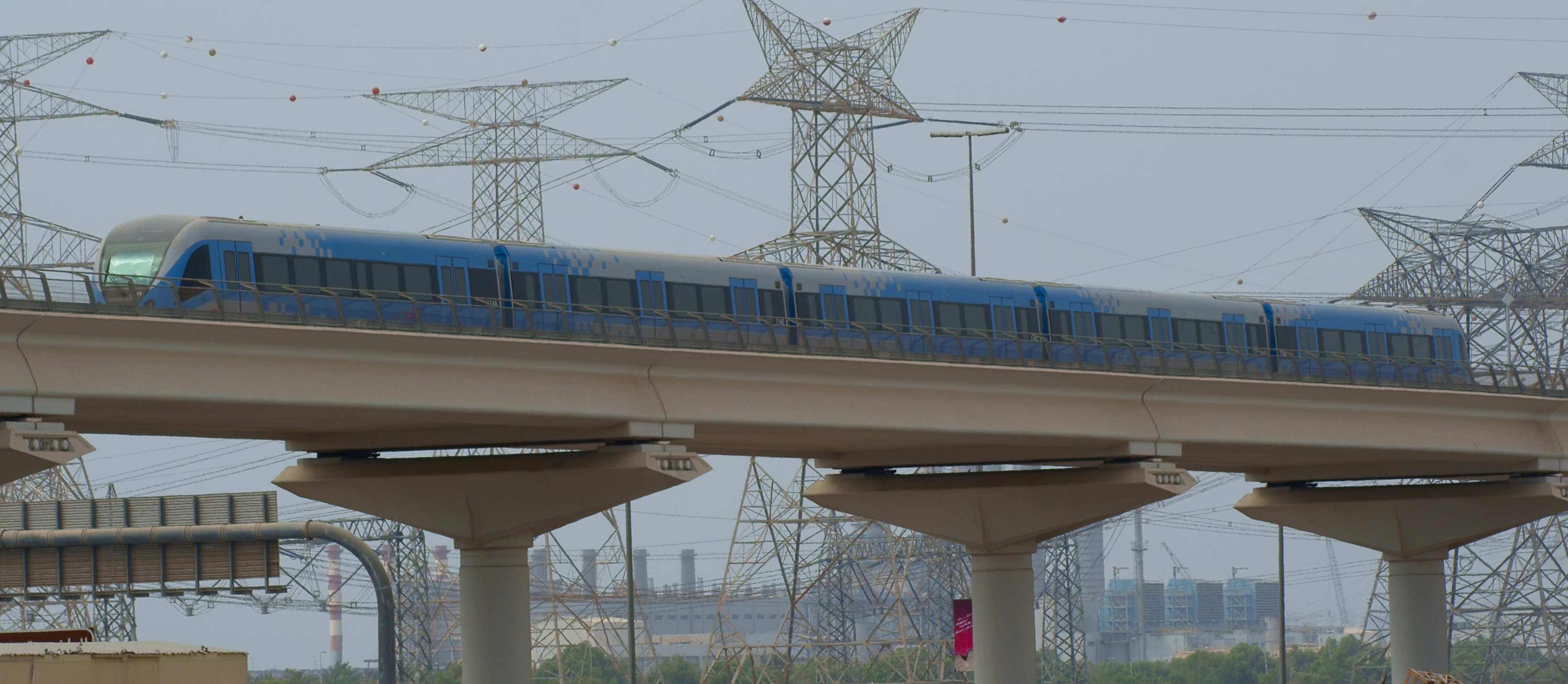 Dubai Metro train